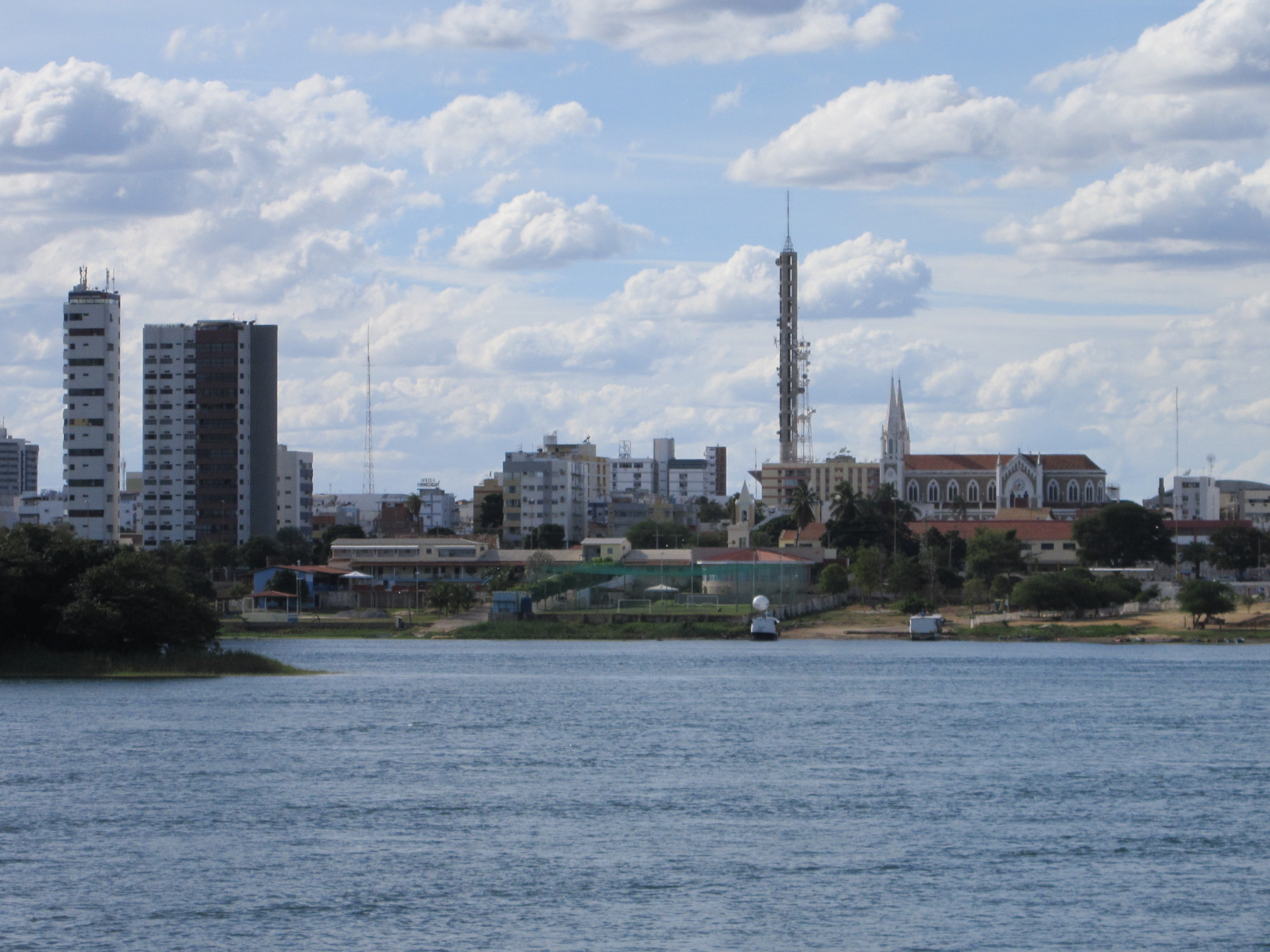 Catedral e Torre da Embratel - Petrolina, Pernambuco, Brasil